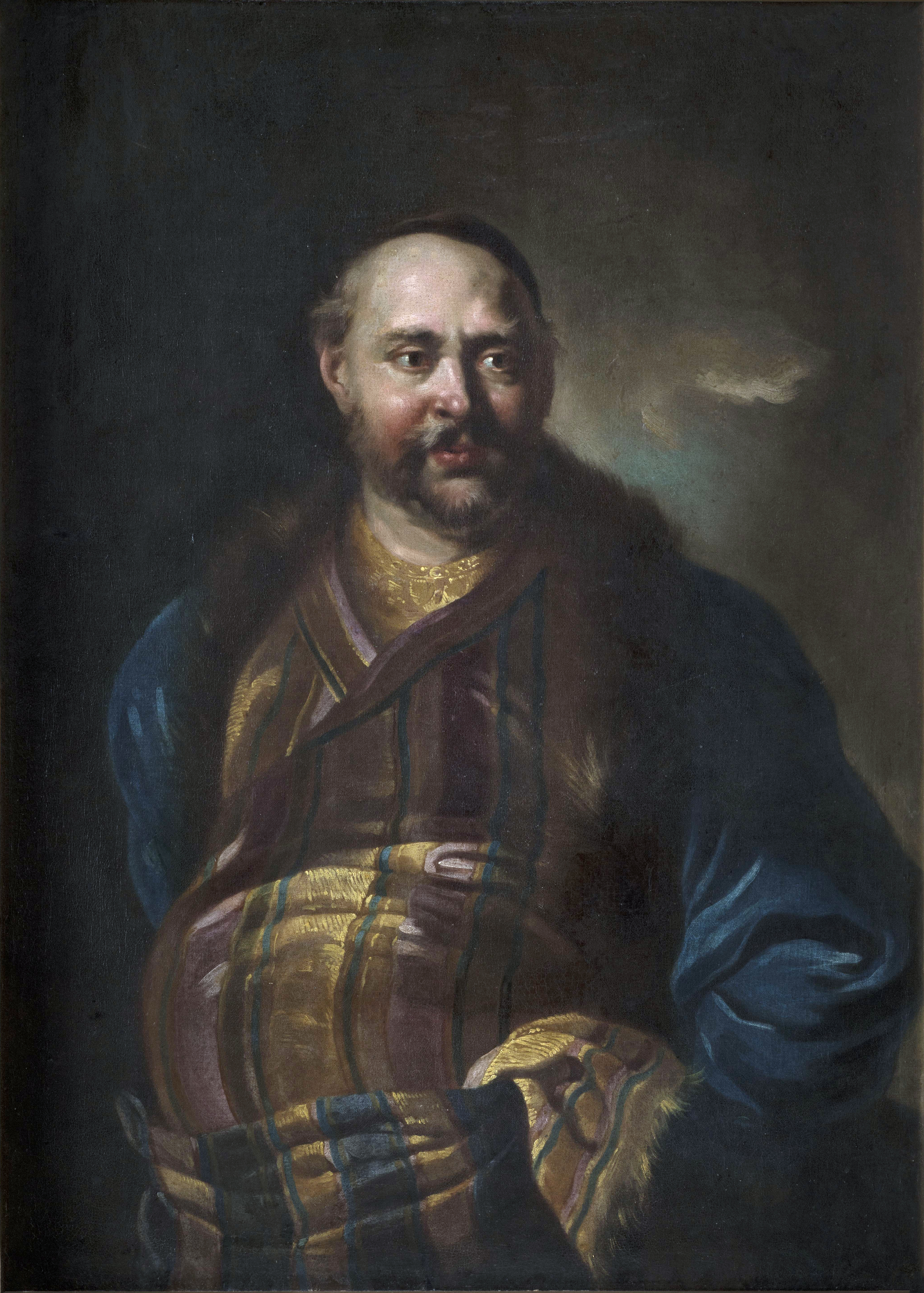 Беларуская (тарашкевіца): Партрэт Людвіка Канстантына Пацея (Ludvik Kanstantyn Paciej)